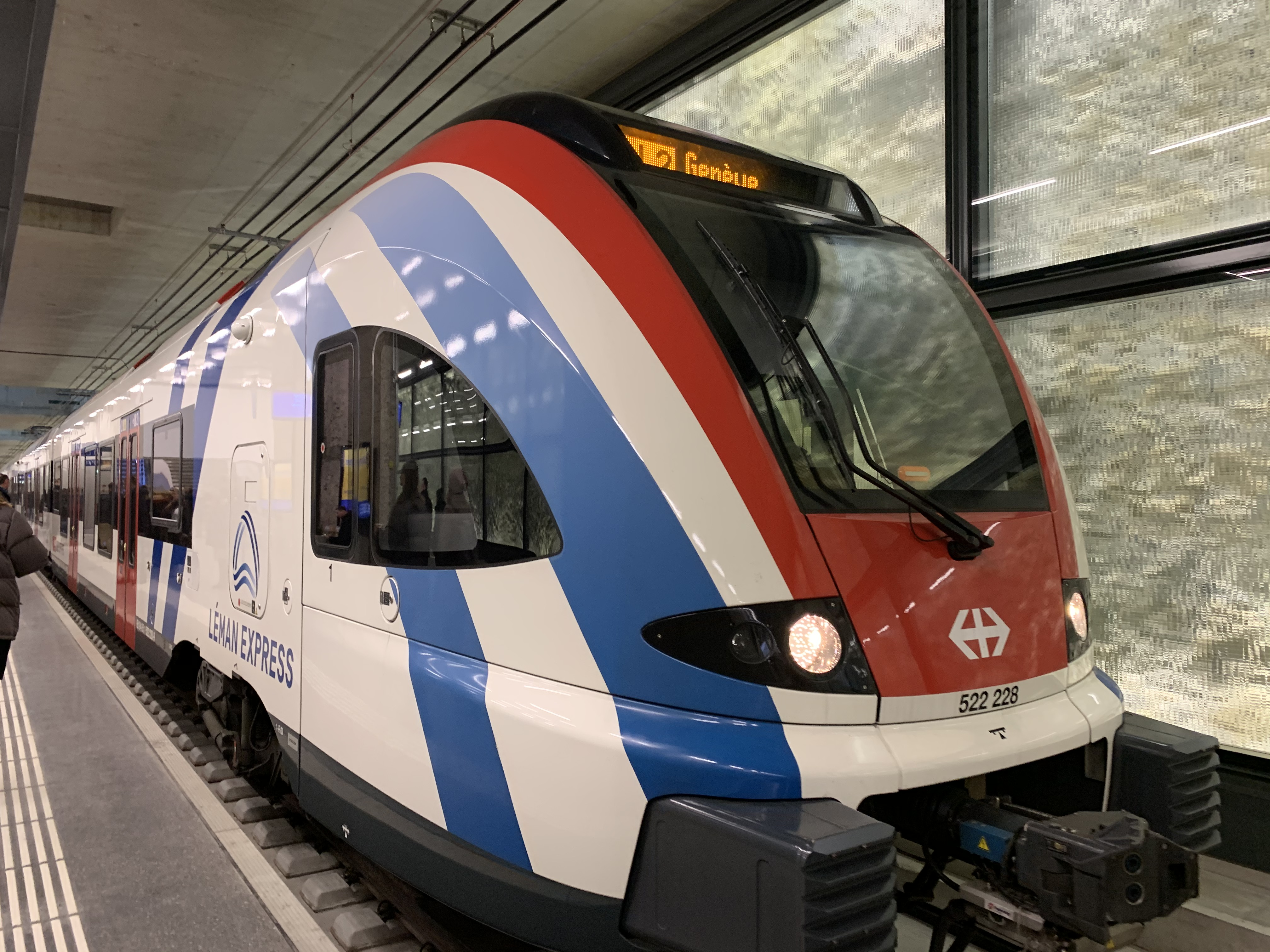 Un train Stadler FLIRT des CFF à Genève-Eaux-Vives en direction de Genève, le premier jour d’exploitation en service commercial de la ligne CEVA.